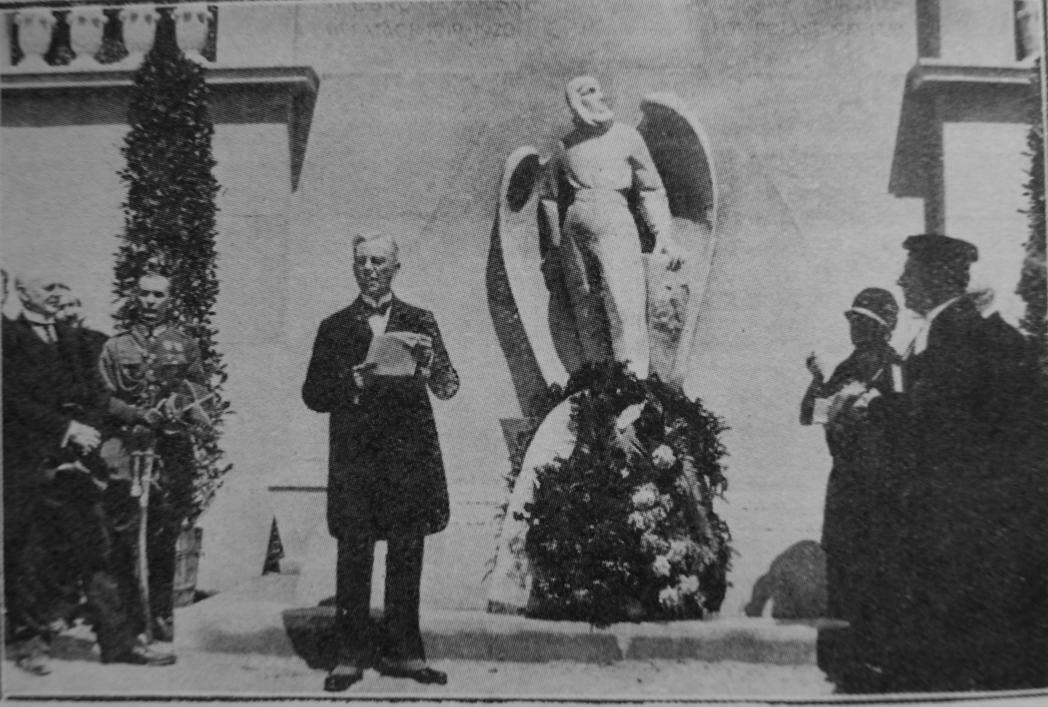 Uroczystość odsłonięcia pomnika poległych amerykańskich lotników na cmentarzu we Lwowie 30 maja 1925. Trzej polegli lotnicy: George Graves, Arthur H. Kelly, T.V. McCallum